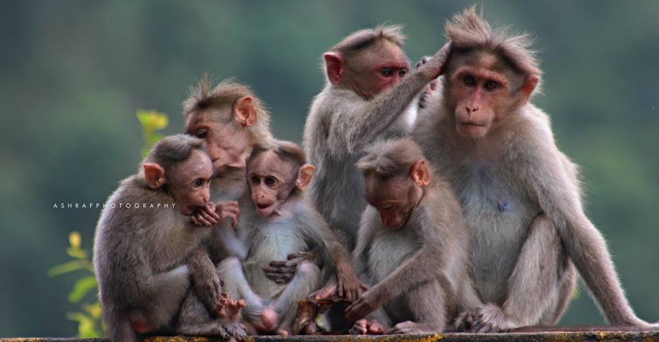 വാനരന്മാർ കൂടിയിരുന്നു വിശ്രമിക്കുന്നു